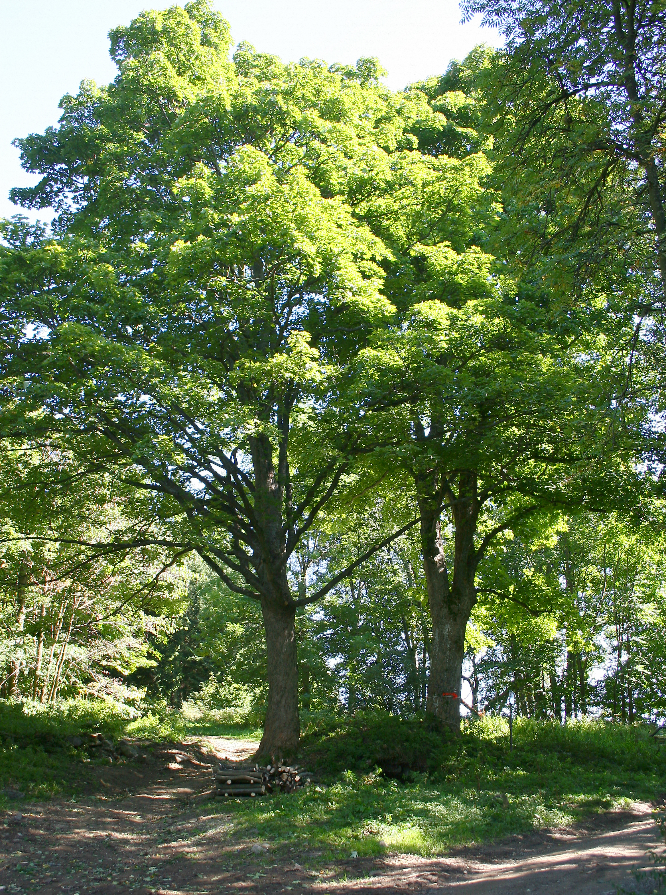 Skupina javorů Ždánov. Dvojice památných stromů, javorů klenů (Acer pseudoplatanus) rostoucích na jihozápadním svahu hory Ždánov. Okres Klatovy, Plzeňský kraj, Česká republika.